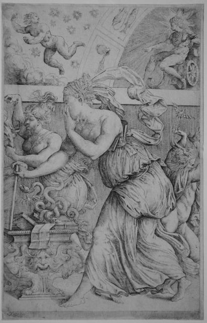 La ricchezza della composizione ha da sempre fatto sì che catalogatori e storici dell’arte fornissero varie interpretazioni del soggetto. Dora e Erwin Panofsky propongono di vedere la cieca Pandora che, aprendo l’elaborata cassa in basso a sinistra, libera il Bene e il Male. Ripetuti sono i rimandi all’eterna lotta fra notte e giorno, buio e luce, ignoranza e intelligenza. Lucifero scende al buio verso gli inferi e Apollo sale verso il sole annunciando una nuova era. Il soggetto è molto vicino alle ricerche della Scuola di Fontainebleau, tuttavia stilisticamente il foglio è certamente di un maestro italiano probabilmente veneziano (l’incisone è stata nel tempo attribuita ad Angelo Falconetto e Battista Angolo del Moro). E’ noto un secondo stato con la data 1643 e il monogramma DIB o CIB che identificherebbe l’editore. In aggiunta a quanto riportato in tutte le bibliografie nel margine inferiore sotto il monogramma la data 1576 è stat chiaramente corretta in 1557, si tratta dunque di un nuovo stato intermedio il I e il II noti. Il disegno preparatorio è in collezione americana con attribuzione dubitativa a Pirro Ligorio (1513 – 1583), architetto e antiquario napoletano ma attivo a Roma per la famiglia Este di Ferrara. Ottima impressione non sempre omogenea, piccoli margini. Ottimo stato di conservazione. Filigrana: “Giglio nel cerchio” simile a Briquet 7127 (Venezia 1584)